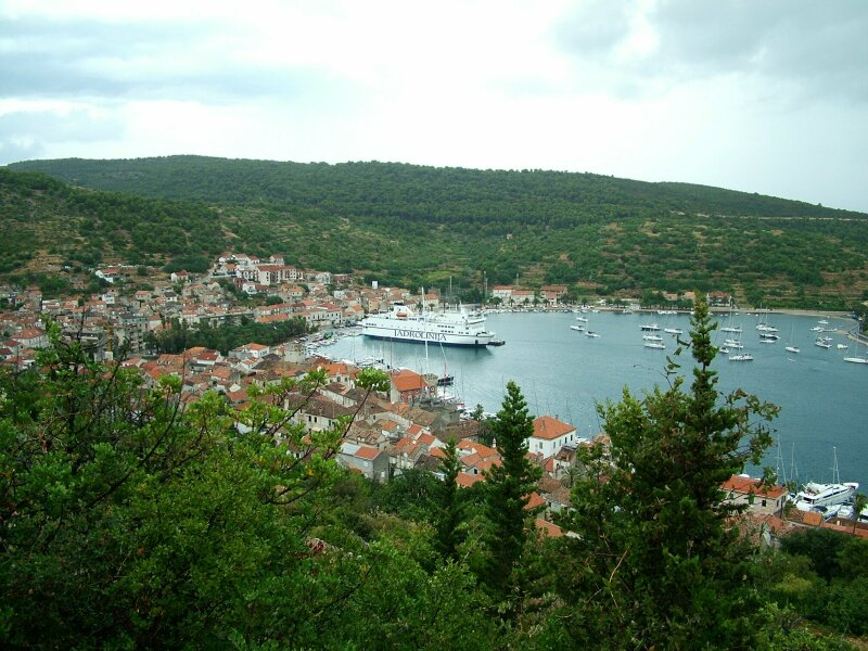 Miasto Vis